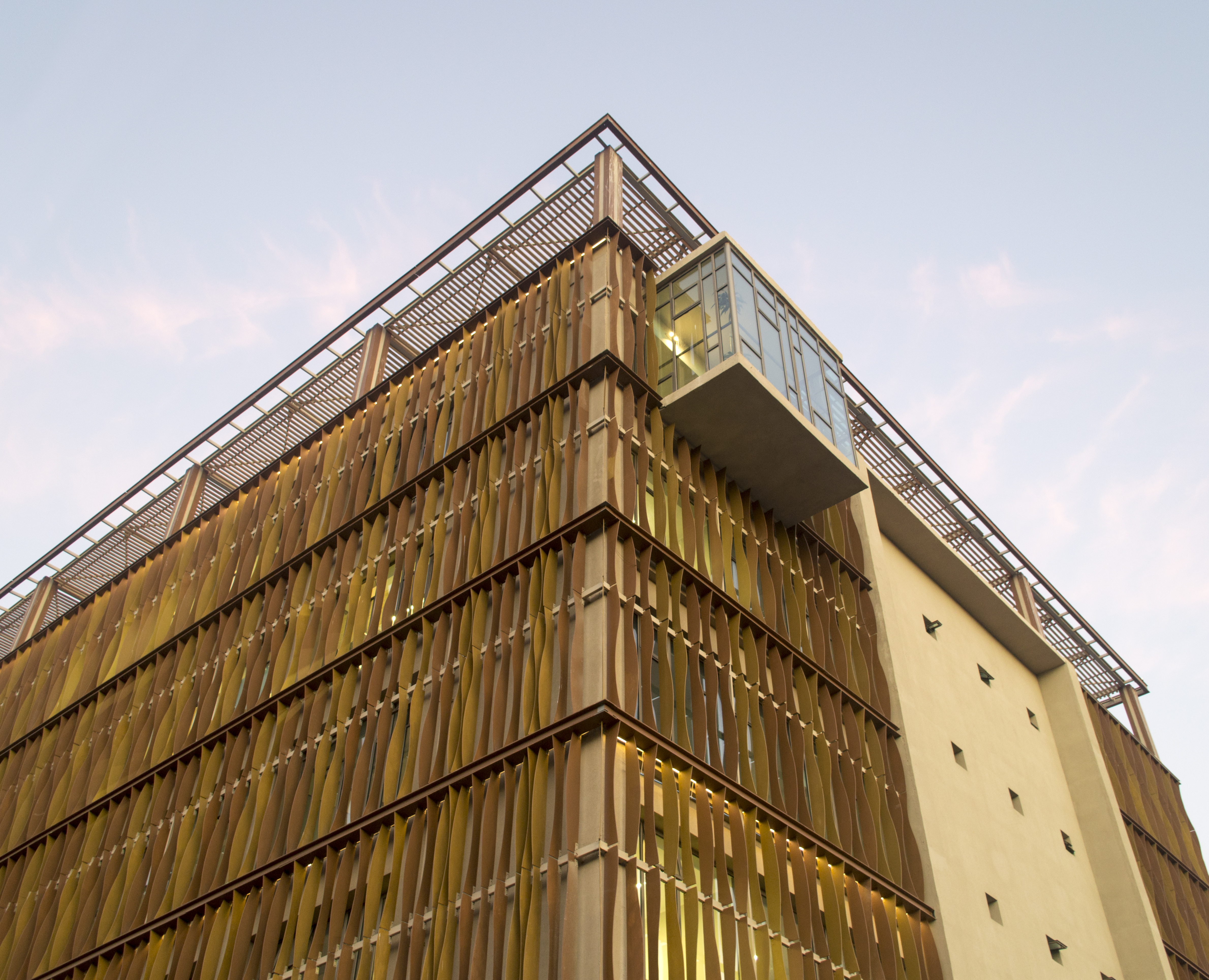 Edificio consistorial de la Ilustre Municipalidad de Tomé, Región del Biobío, Chile.